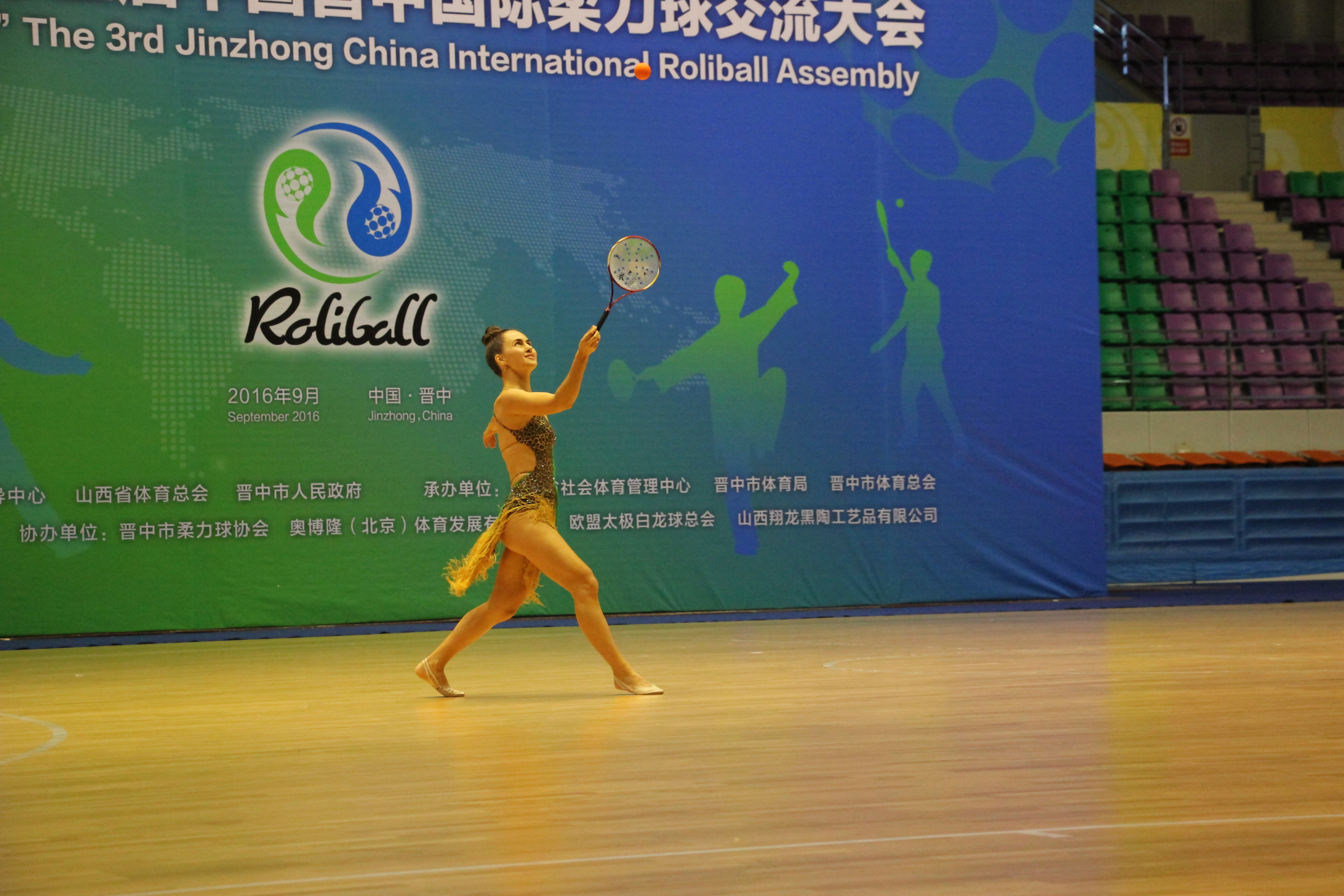 Сольное выступление фристайл на 3-й всемирной Ассамблее по ролиболу в Китае